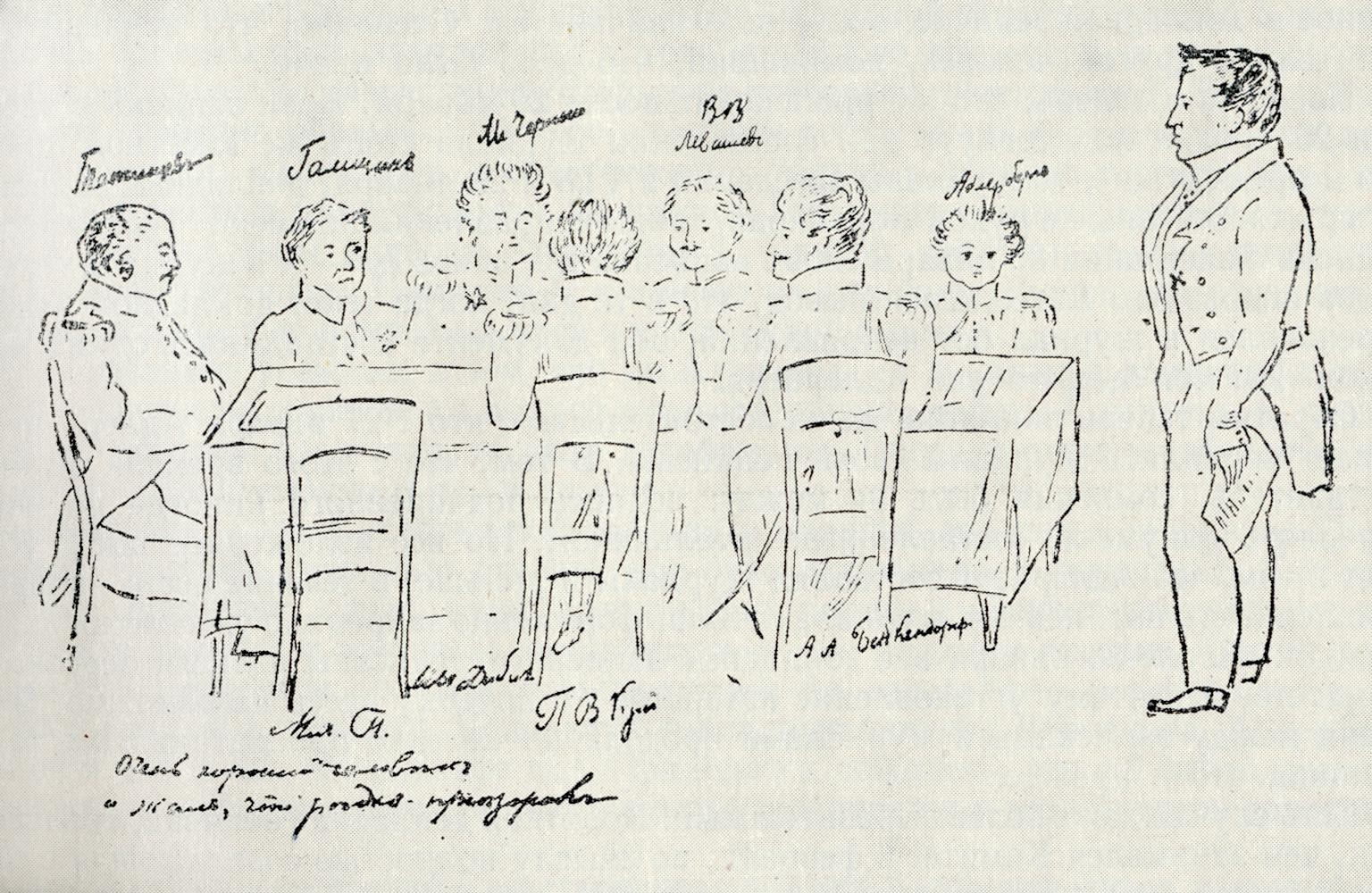 Допрос декабриста Следственным комитетов в 1826 г. Рис. В.Ф. Адлерберга (1791-1884)